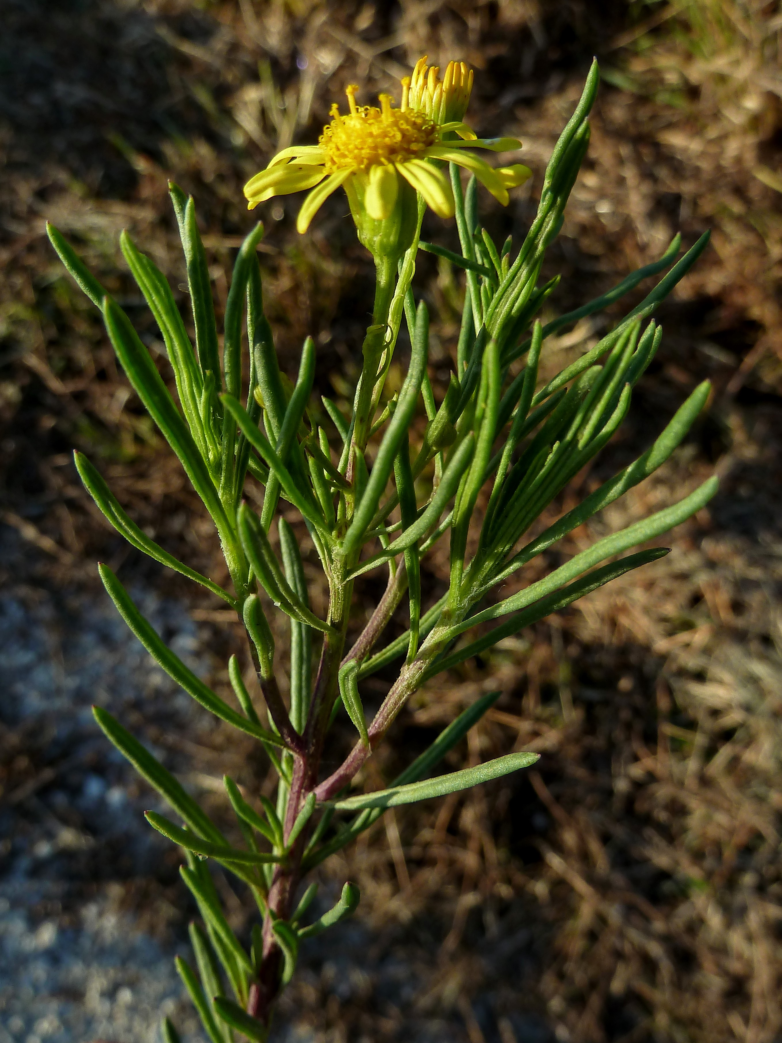 Senecio nevadensis subsp. malacitanus (Azuzón real, suzón de romero) - Inflorescencia incipiente. Noten las hojas lineales de bordes revolutos. - Camino de La Murada, Albatera (Provincia de Alicante), España.